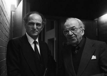 Freiburg im Breisgau: Landesrabbiner Dr. Levinson in der Katholischen Akademie [mit Hans Heinz Altmann]